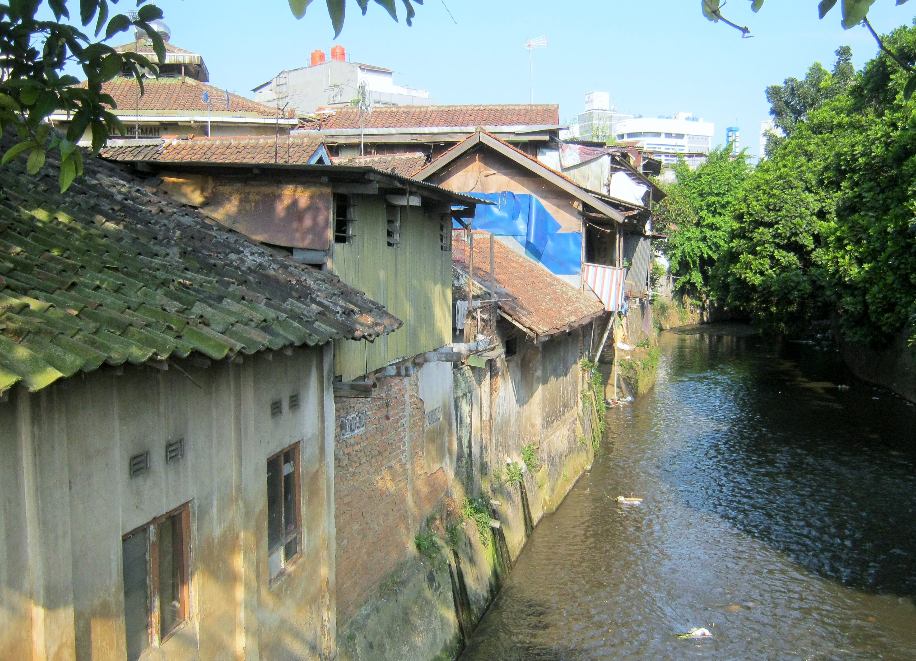 Pemukiman Sungai Cikapundung, Jl. Braga, Bandung